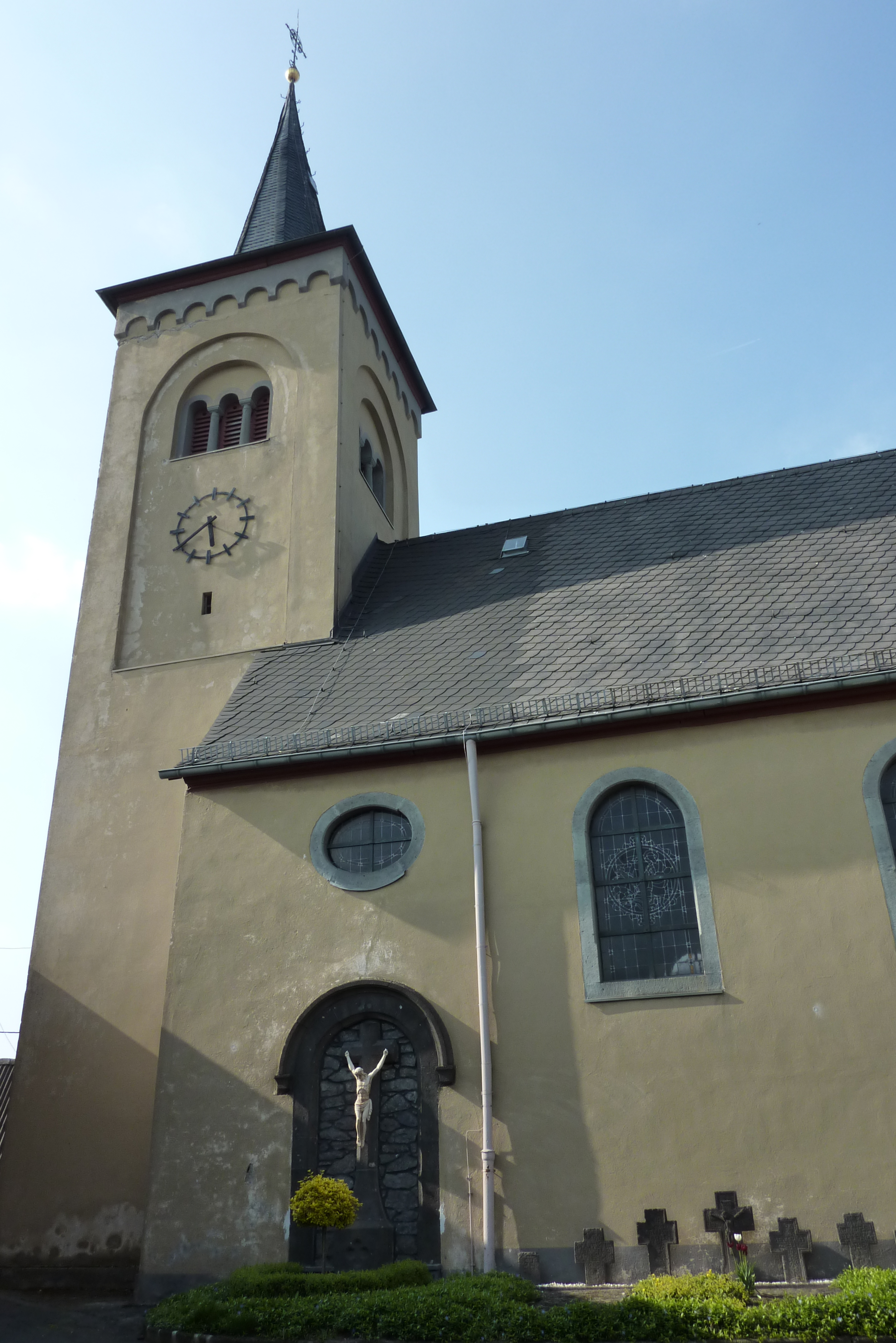 St. Simeon in Düngenheim, Außenaufnahme mit Turm